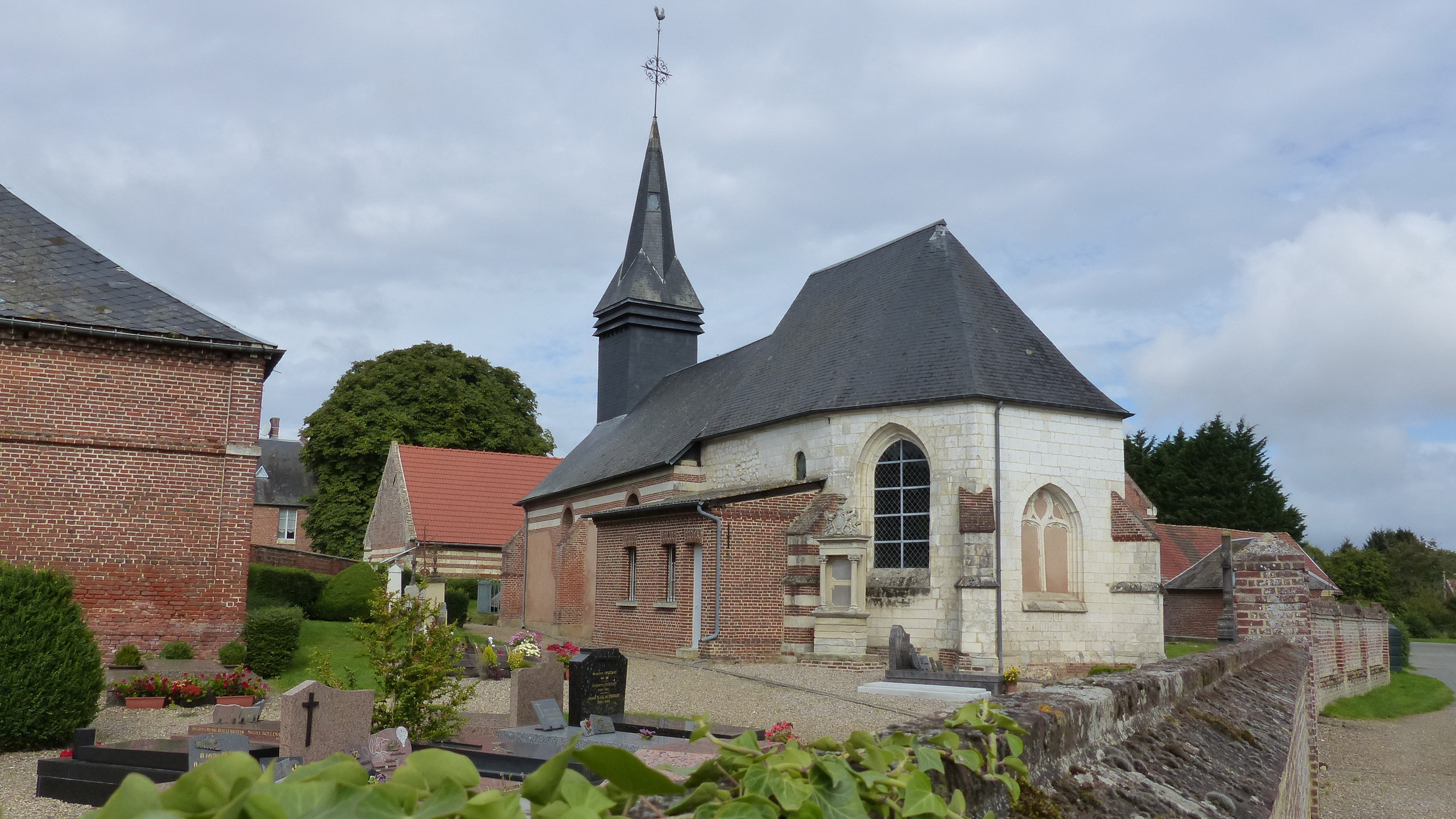 Église de la Nativité Notre-Dame de Choqueuse-les-Bénard